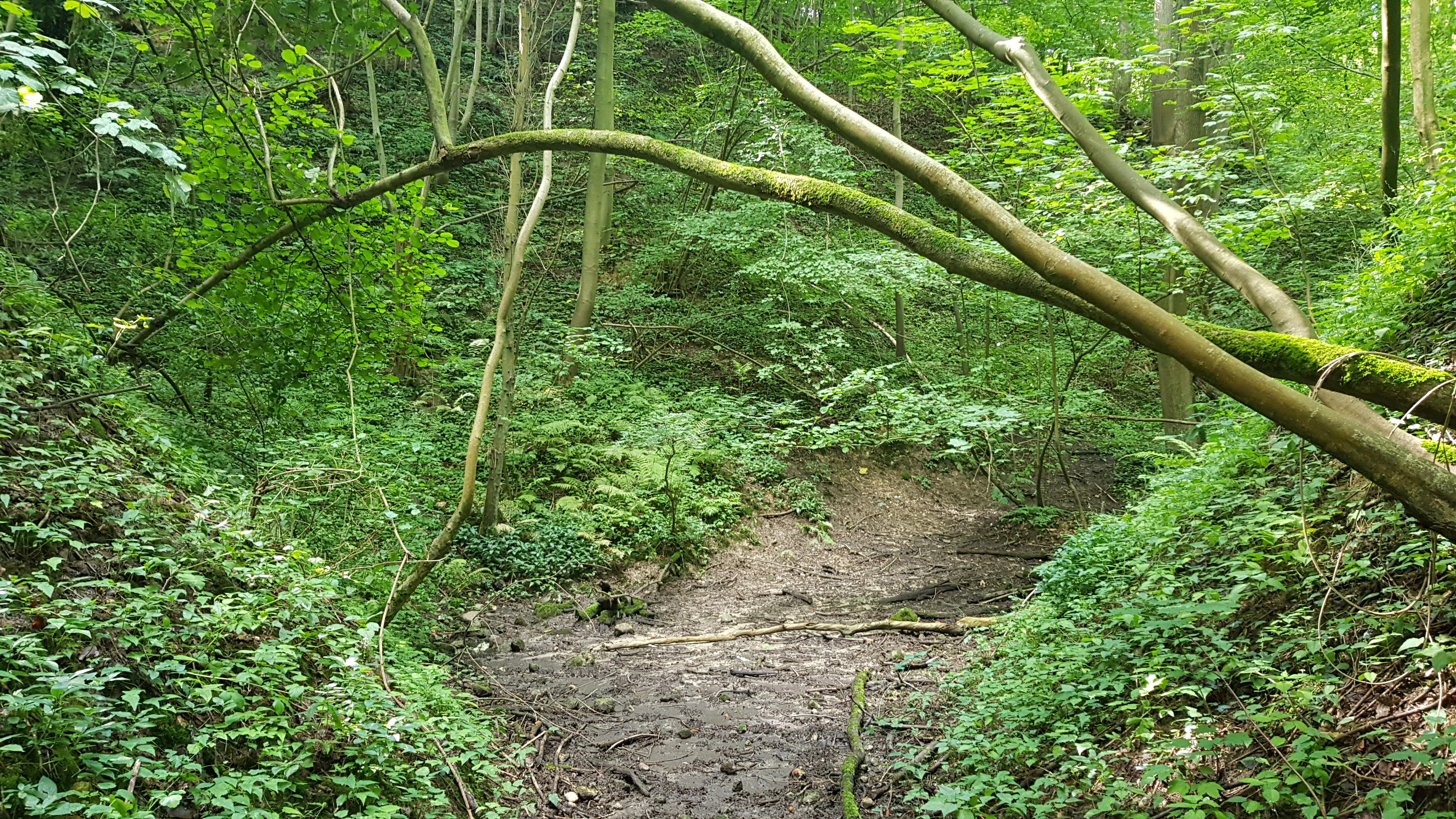 Groeve Dellen oude werken, Meerssen, Nederland